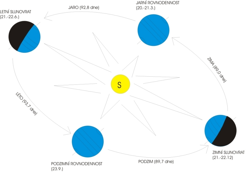 Střídání ročních období